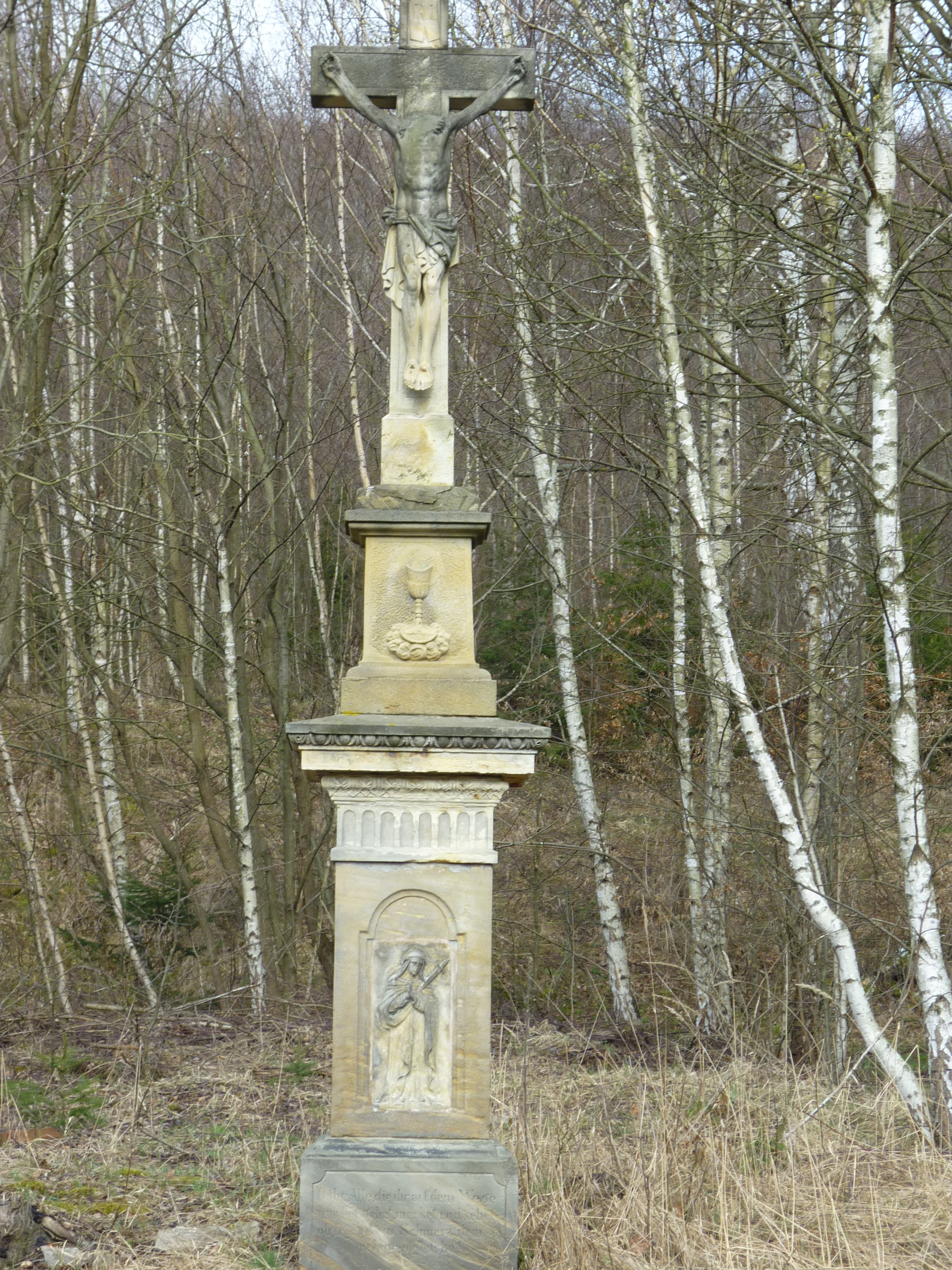 torzo kříže v zaniklé osadě Kyjanice